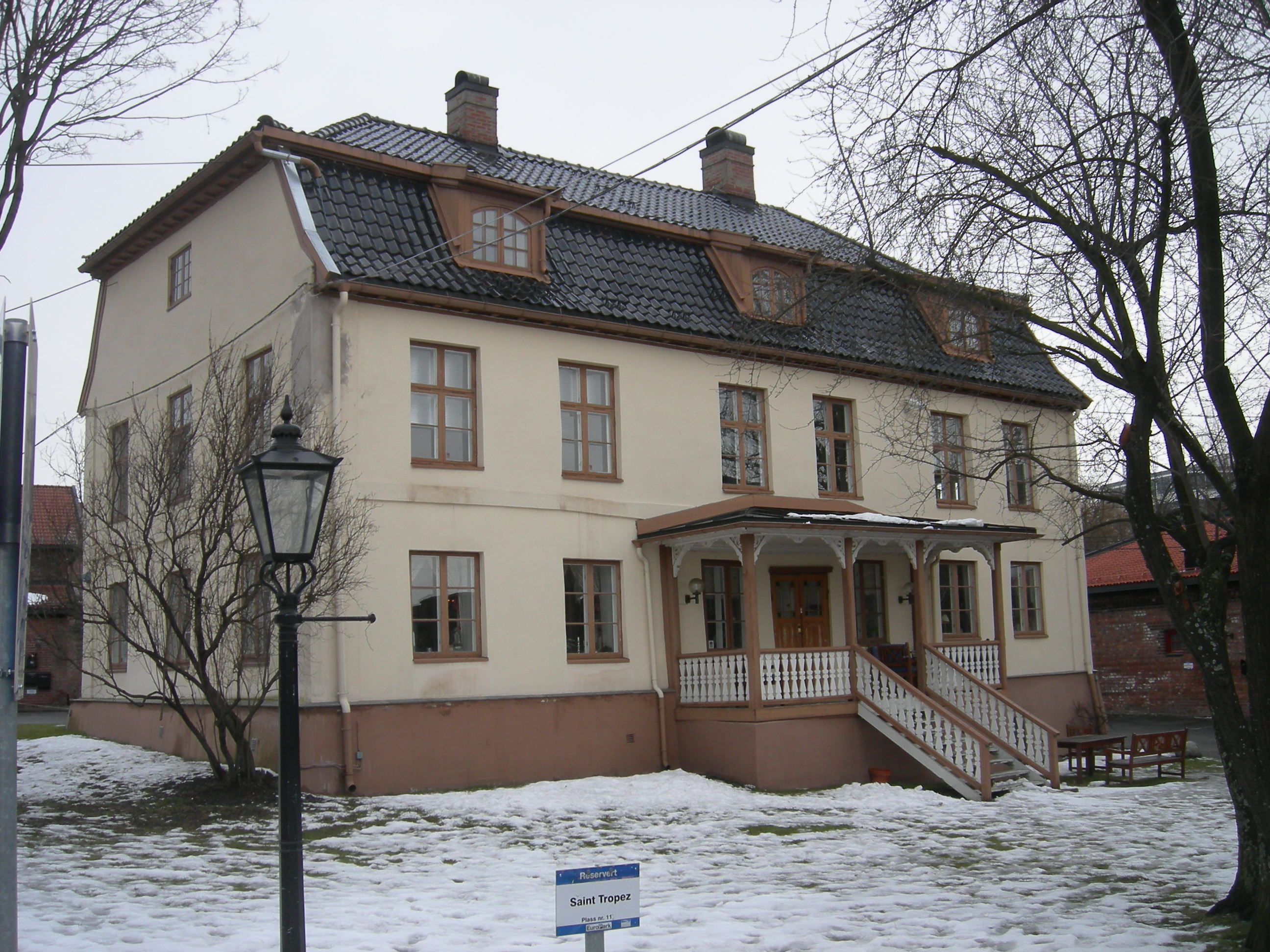 Nedre Vøyen gård, Sagene, Oslo, Norway